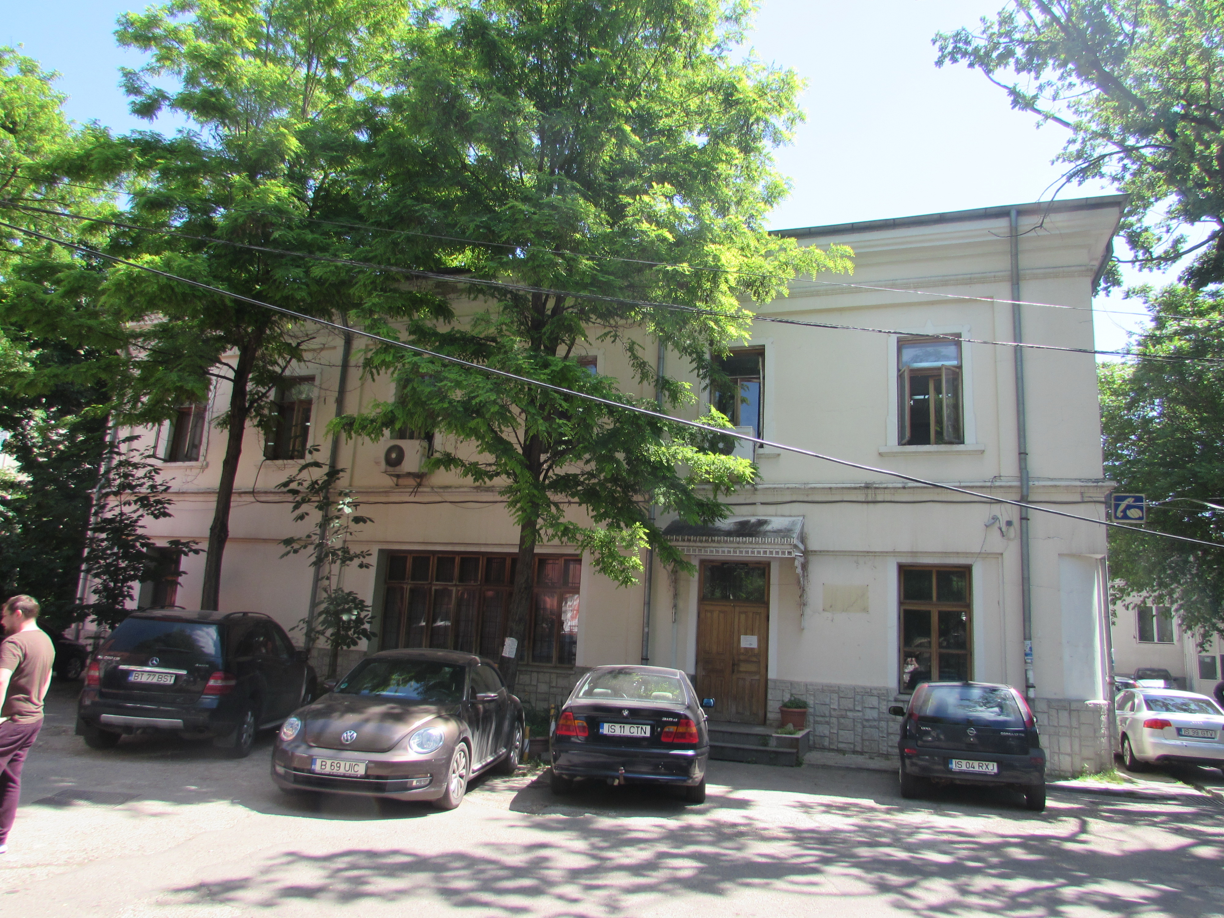 Școala de Arte și Meserii din Iași, clădire monument istoric datând din secolul al XIX-lea, plus parcul adiacent